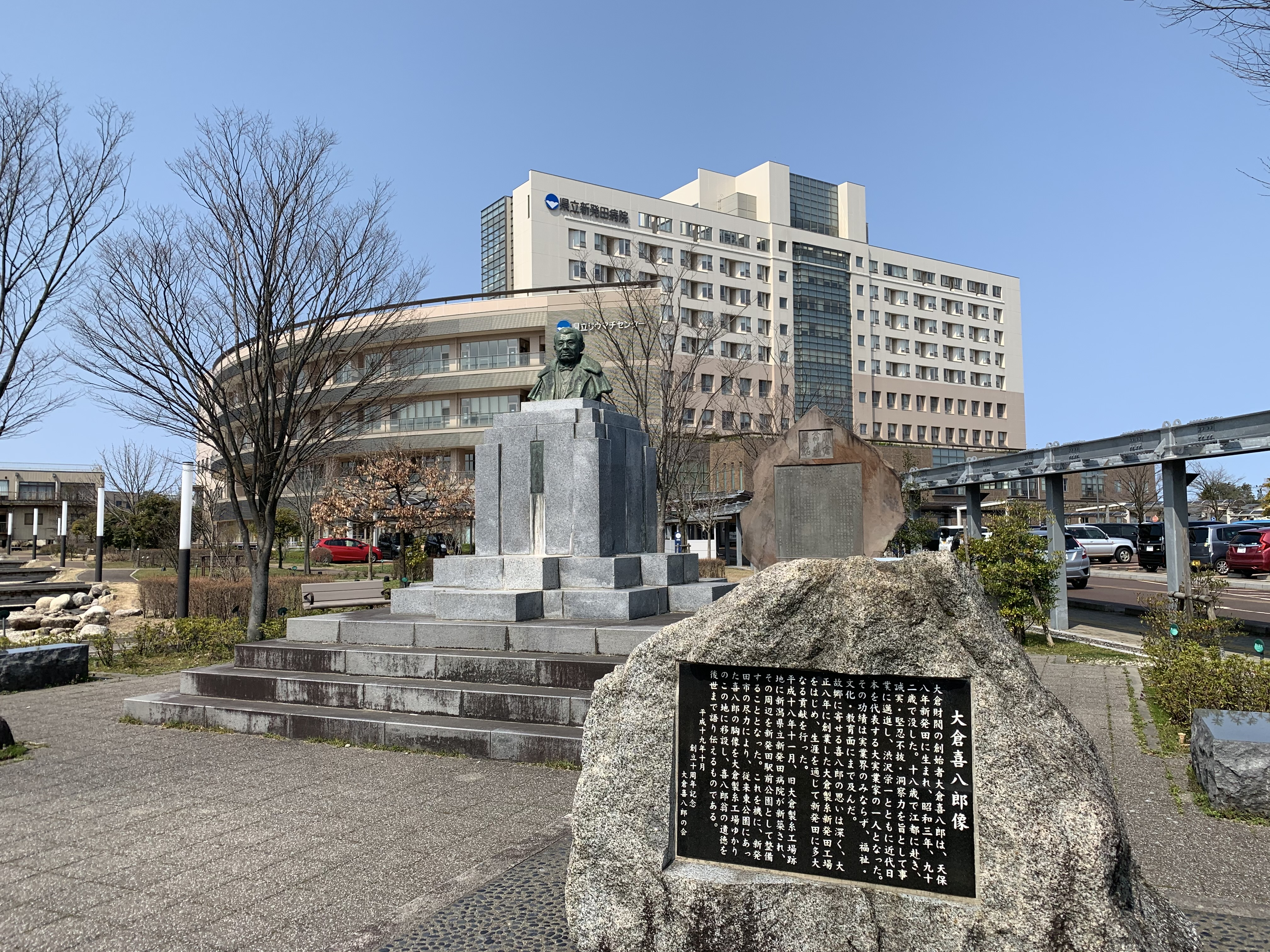 新潟県立新発田病院と大倉喜八郎像（2020年3月）